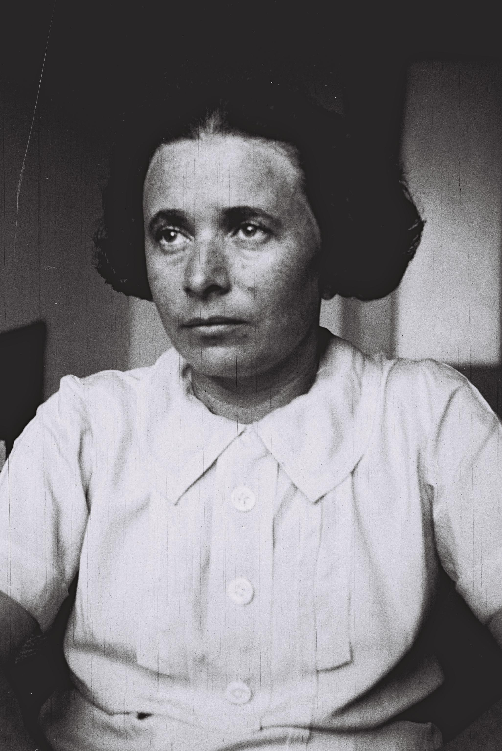 אנדה עמיר-פינקרפלד